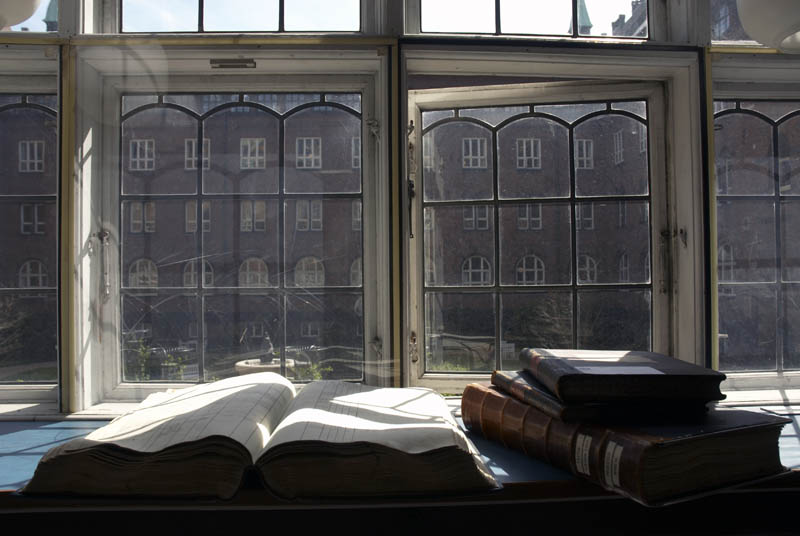 Udsigt til Rådhushaven fra læsesalen.